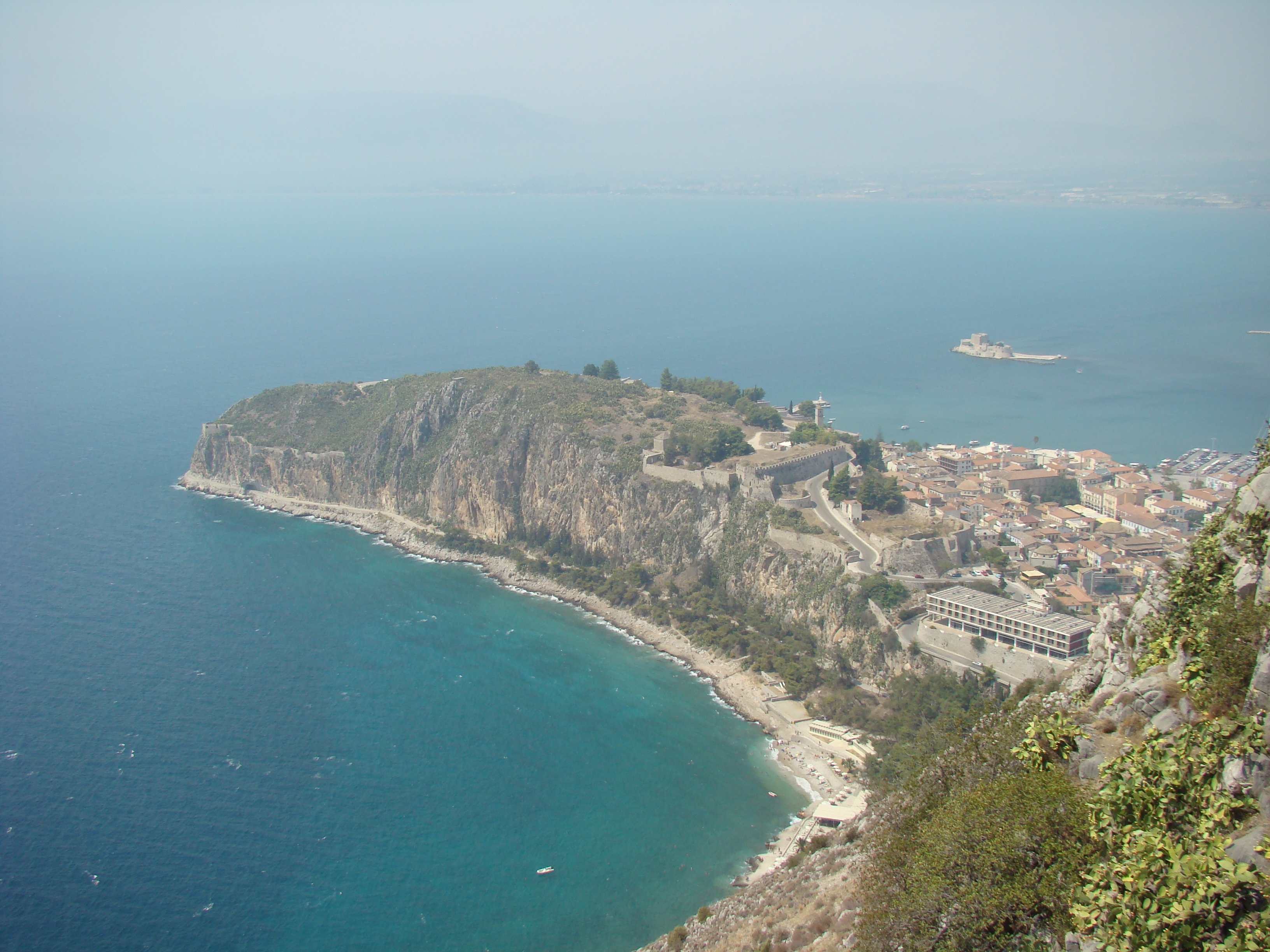 Imagen de Nafplio